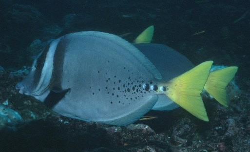 Prionurus laticlavius en Galápagos, Ecuador